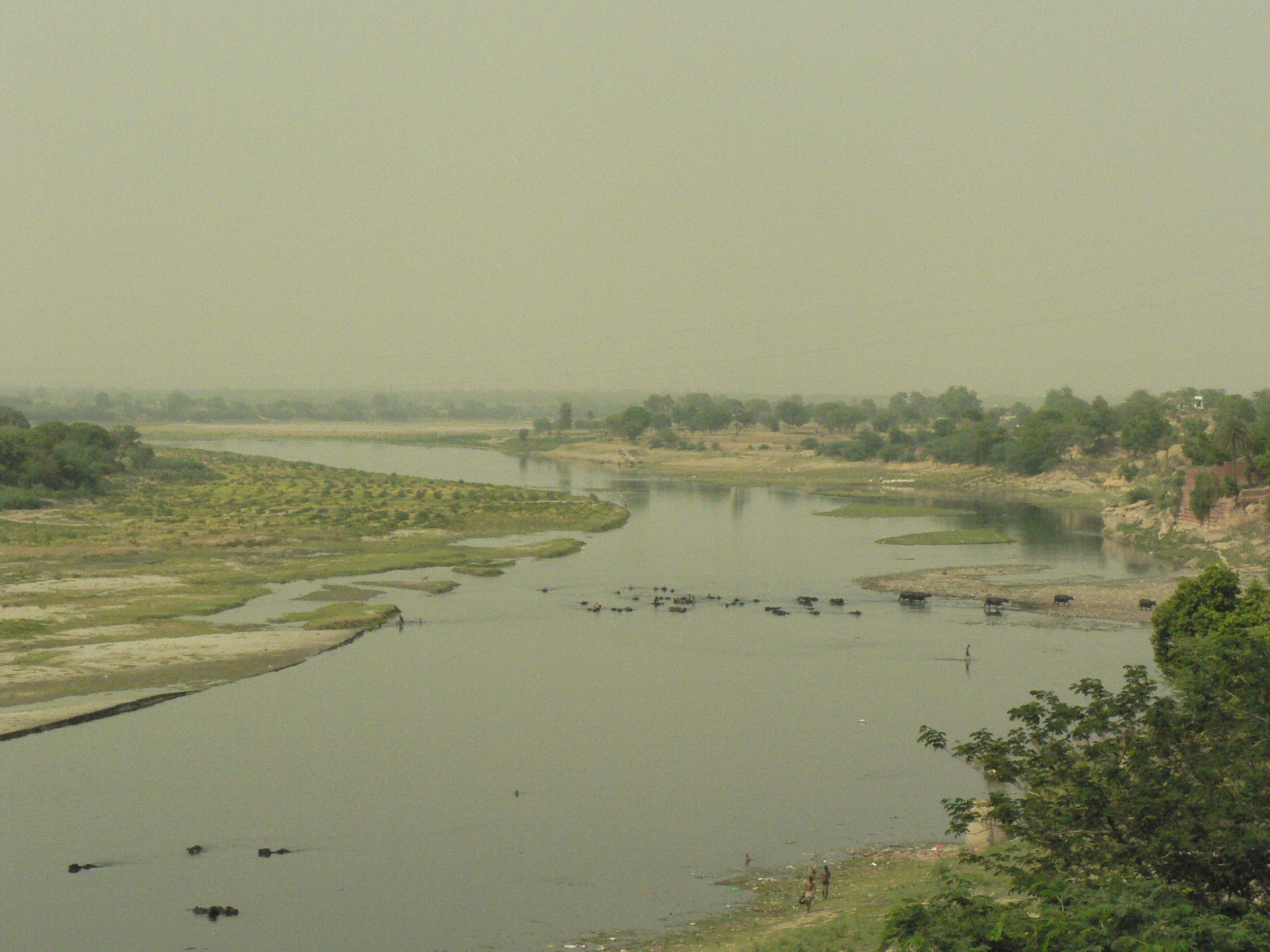 1.2 only